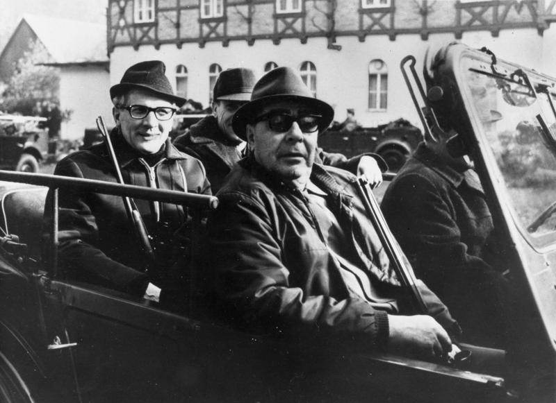 Erich Honecker, Leonid Breshnew ADN-ZB, Archiv, 10.9.80, Erich Honecker (l.) und Leonid Breshnew auf einem Jagdausflug in der DDR 1971. Abgebildete Personen: Breshnew, Leonid: Generalsekretär KP, Vorsitzender des Präsidiums des Obersten Sowjets, Sowjetunion Honecker, Erich: Staatsratsvorsitzender, Generalsekretär des ZK der SED, DDR (GND 118553399)